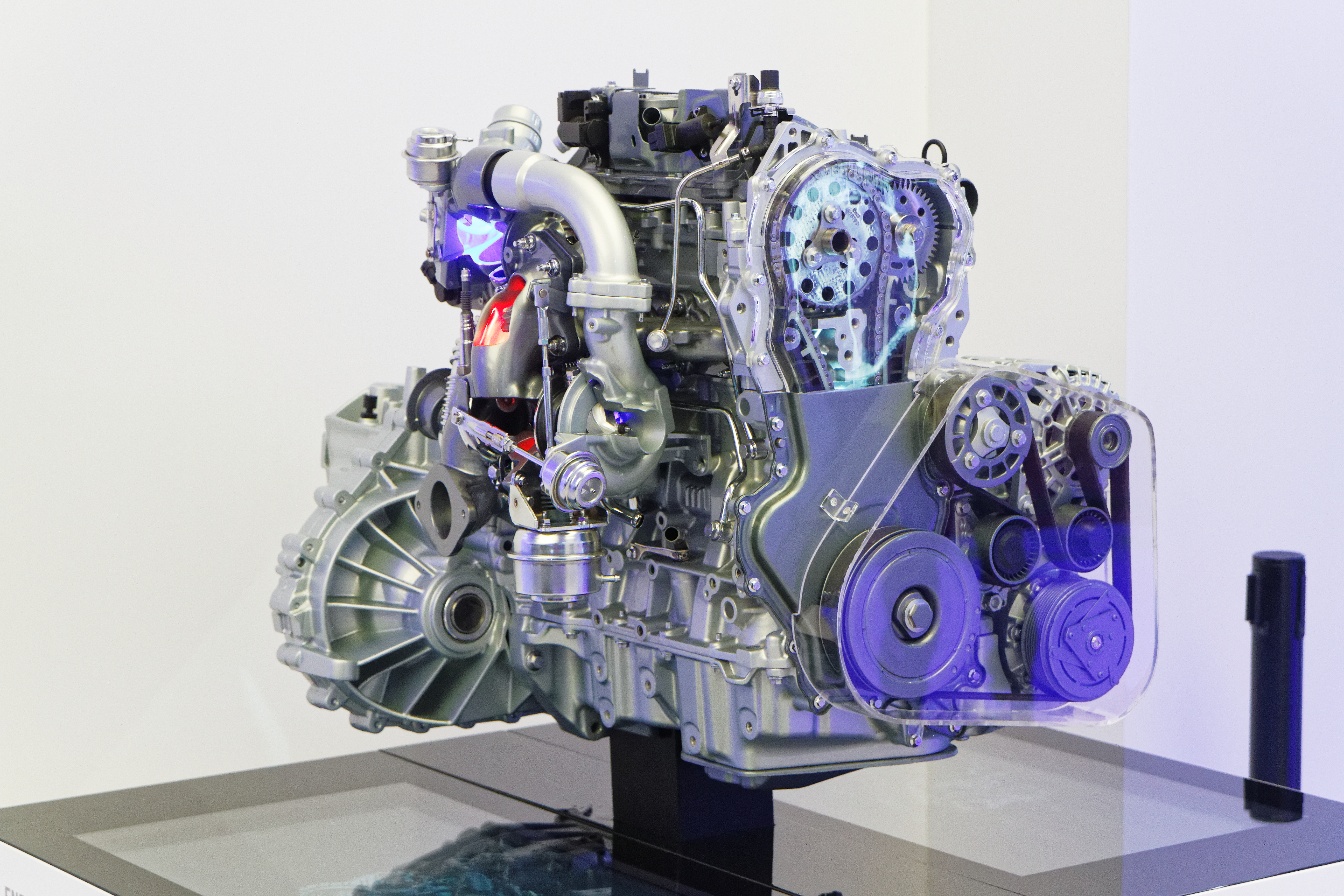 Un moteur energy dCi 160 twin turbo EDC Renault présentée lors du mondial de l'automobile de Paris 2014.